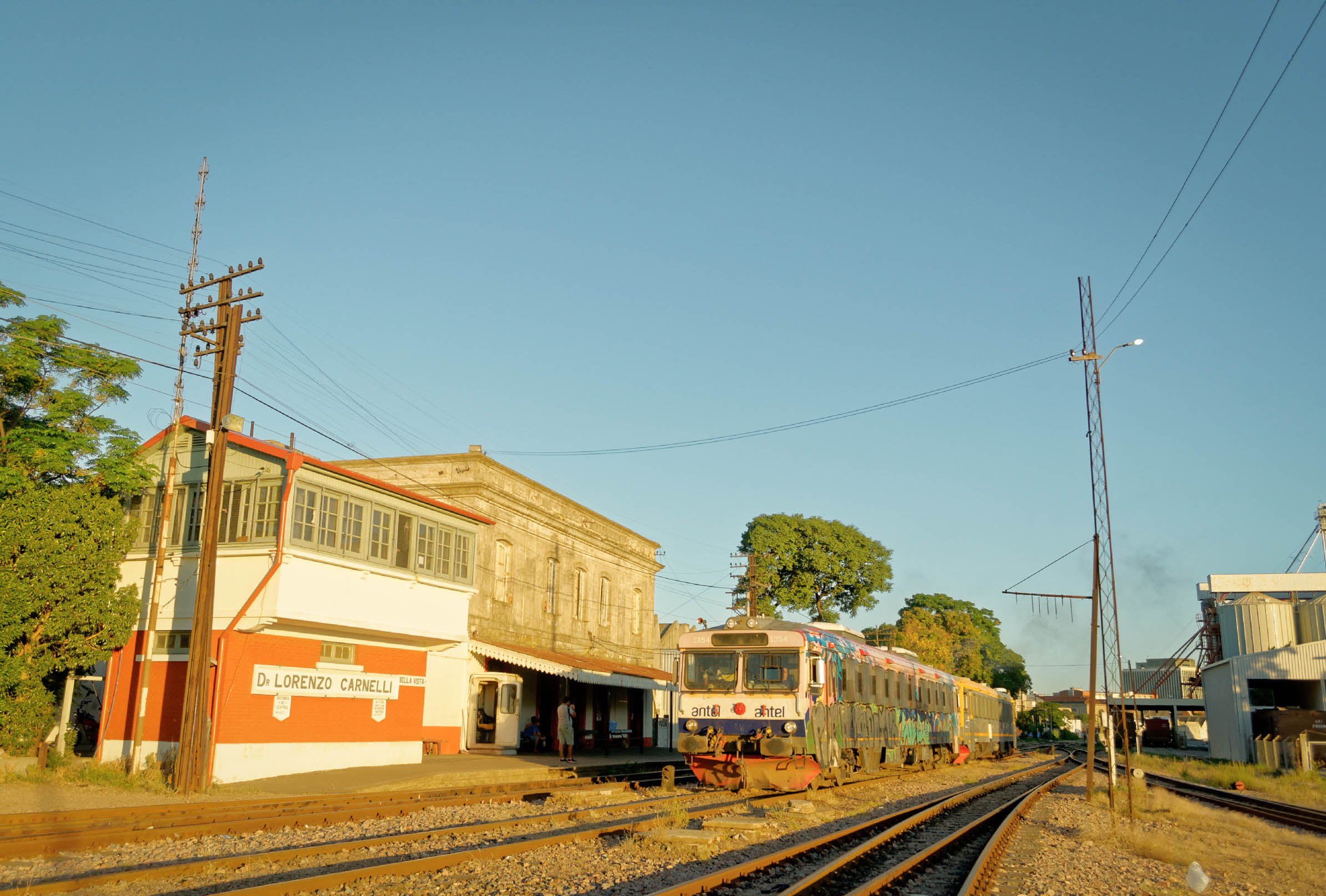 Ultimo servicio del dia hacia la localidad de 25 de Agosto, a su paso por Dr. Lorenzo Carnelli, que ademas de ser estación, posee un importante patio y talleres, lugar en donde llegan todos los trenes de cargas procedentes desde diversos puntos del país con destino final, el puerto de Montevideo